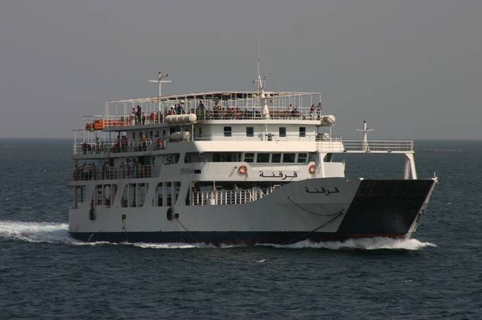 photo perso mars 2006 du car-ferry effectuant la rotation entre Sfax et Sidi Youssef embarcadère des îles Kerkennah lors de trajets de 75 minutes environ.